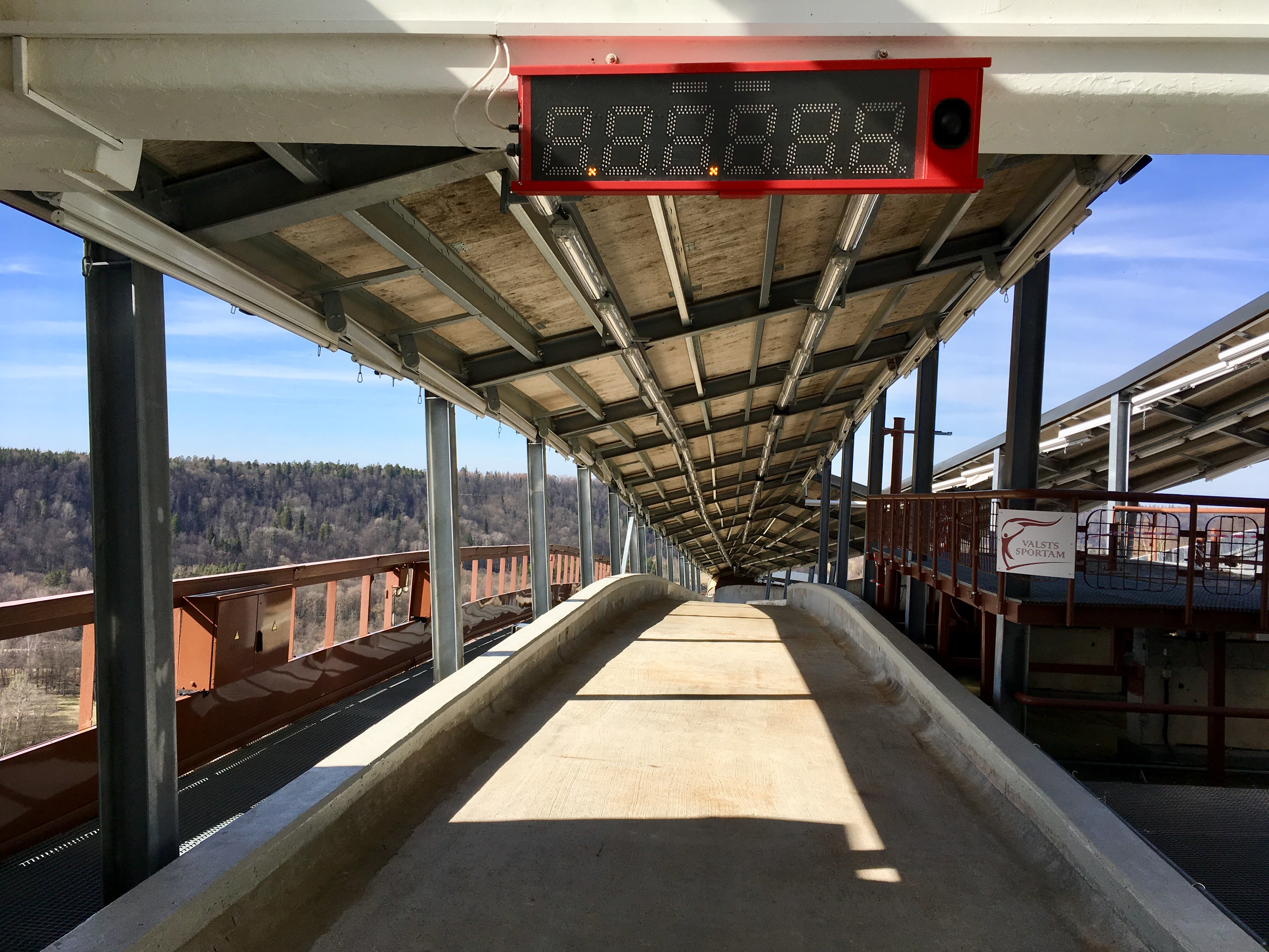 Sigulda bobsleigh, luge, and skeleton track.